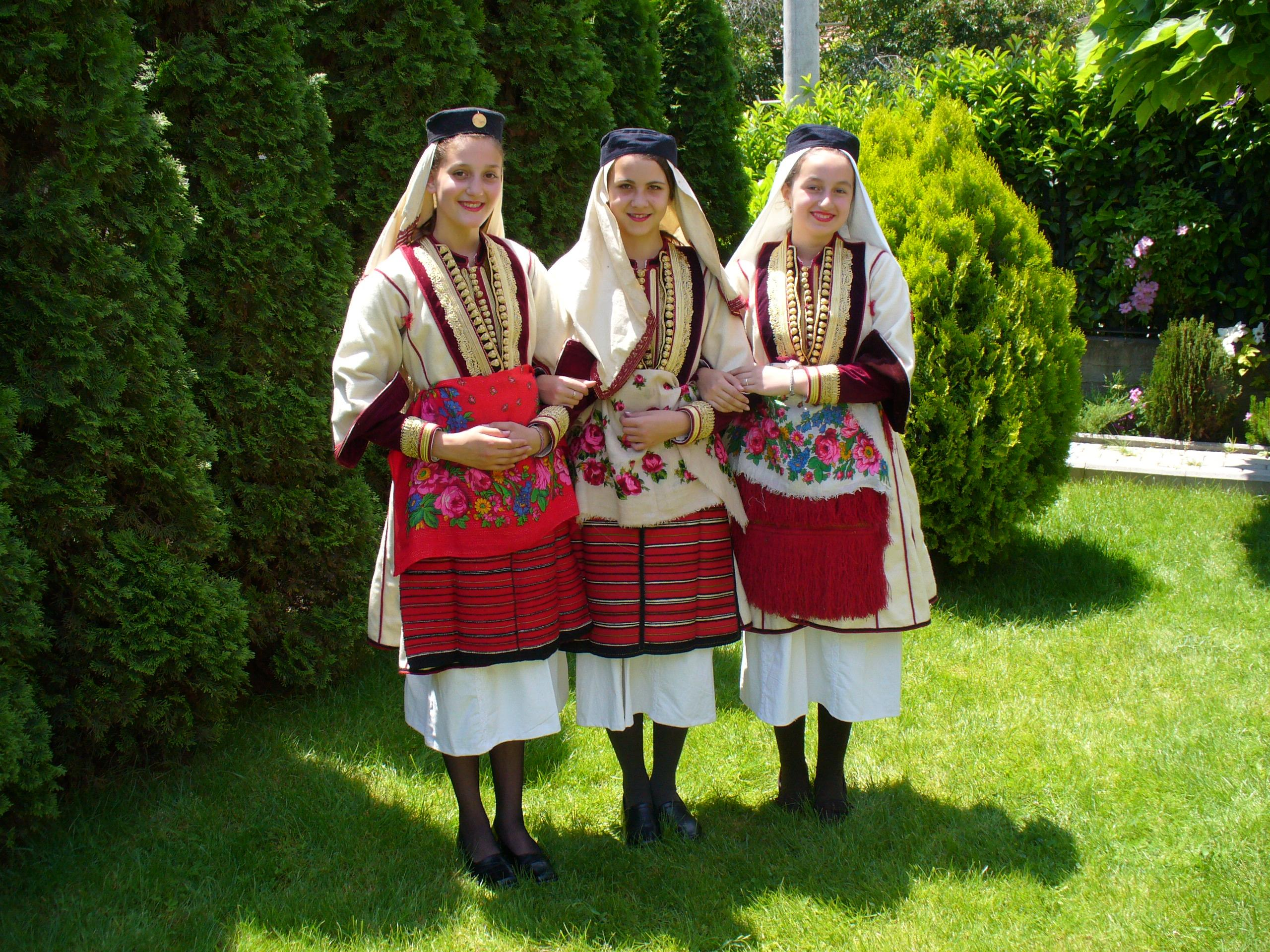 mijačka mominska nosija